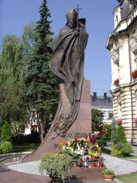 Pomnik Jana Pawła II w Nowym Sączu. Umiejscowiony jest na rynku, obok ratusza. Wykonany jest z granitu, brązu i z kawałków czerwonego marmuru. Waży ok. 8 ton.